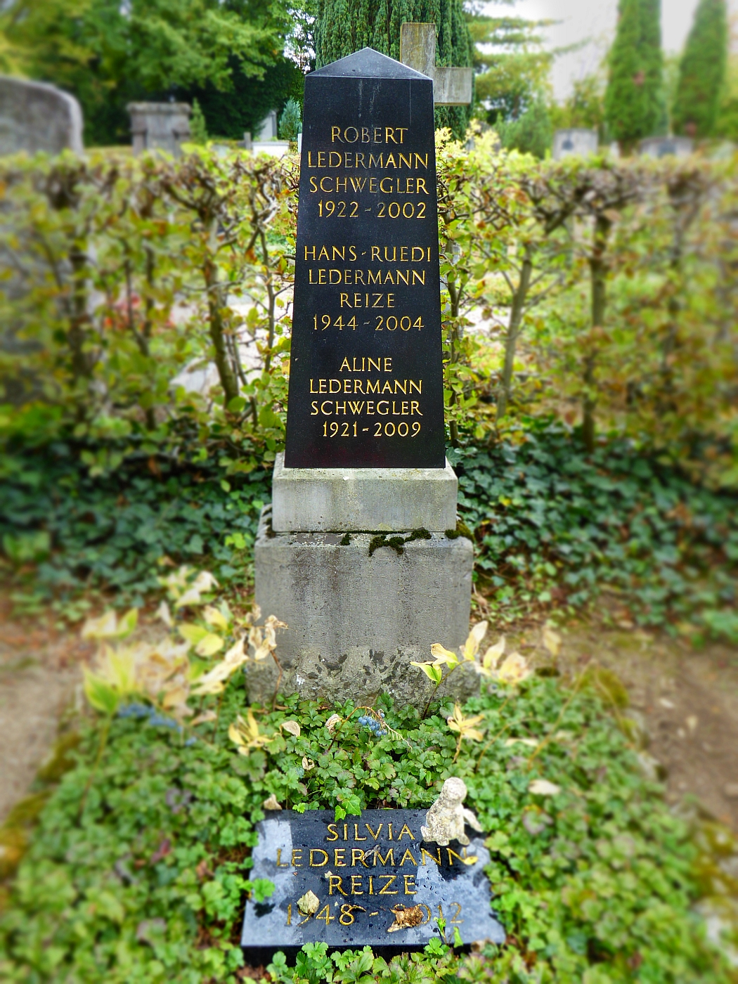 Silvia Ledermann-Reize (1948–2012) Schauspielerin. Grab auf dem Friedhof Wolfgottesacker, Basel